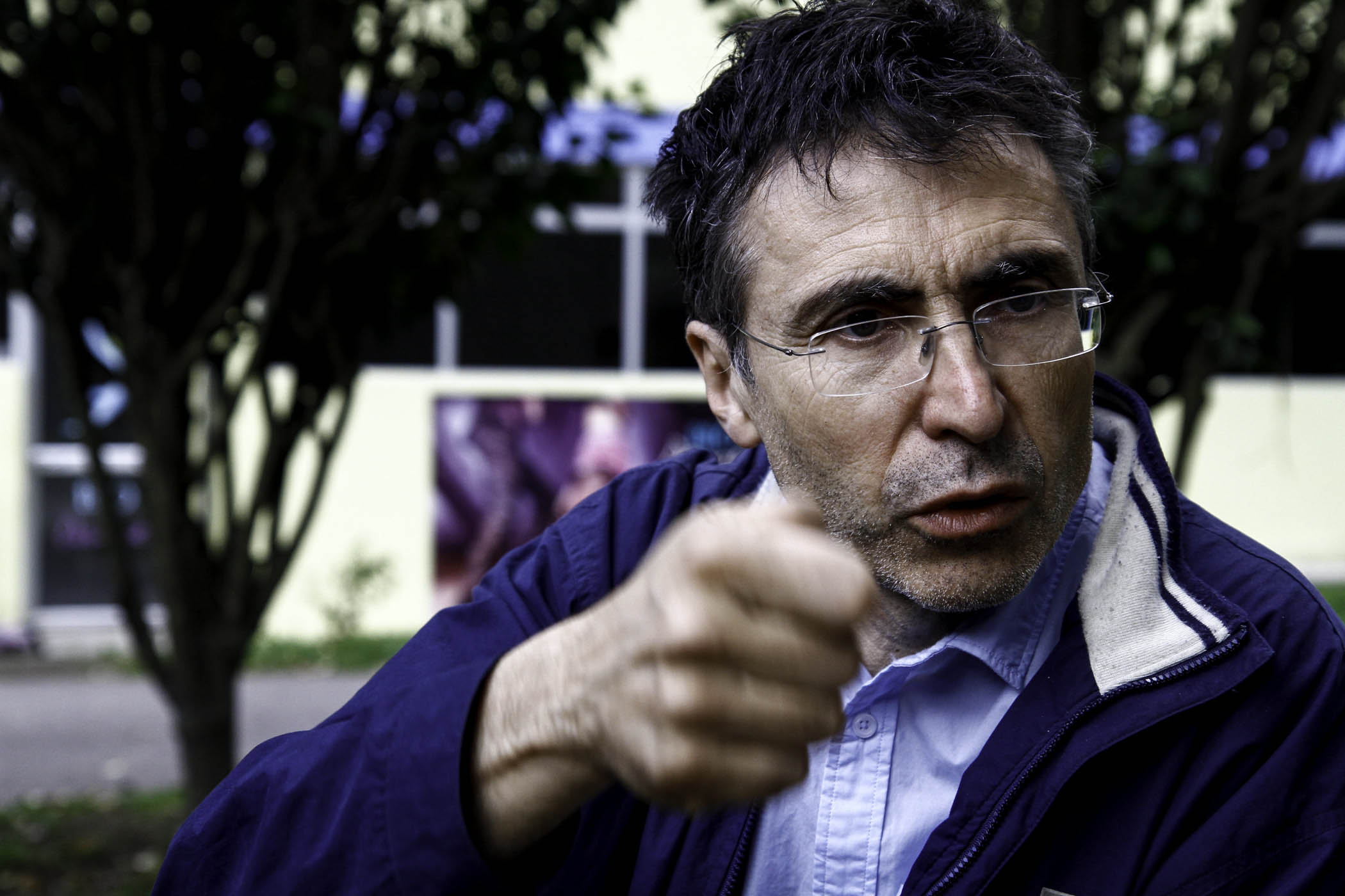 Quito, 16 mar (ANDES).- Los documentalistas franceses Pierre Carles y Nina Faure, hablan de su producción "Operación Correa". Foto: Micaela Ayala V./ANDES